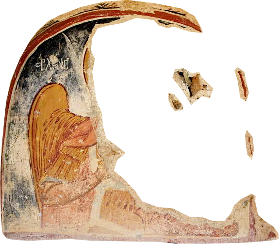 Стенопис от църквата „Свети Димитър“ край македонското село Жван